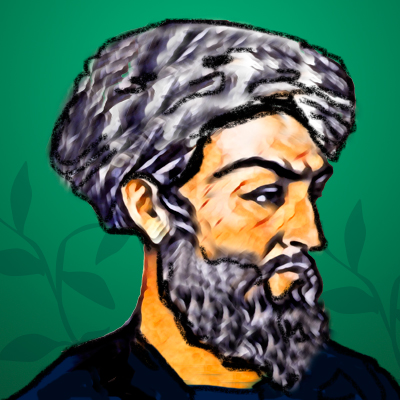 Ilustración del botánico Abual-Abbás al-Nabati.